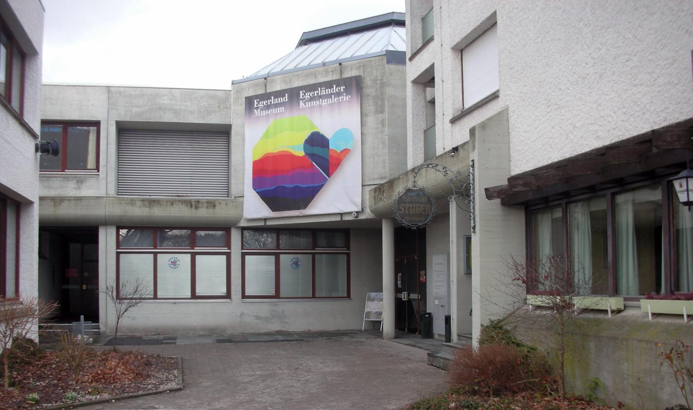 Eingang zum Egerlandmuseum in Marktredwitz